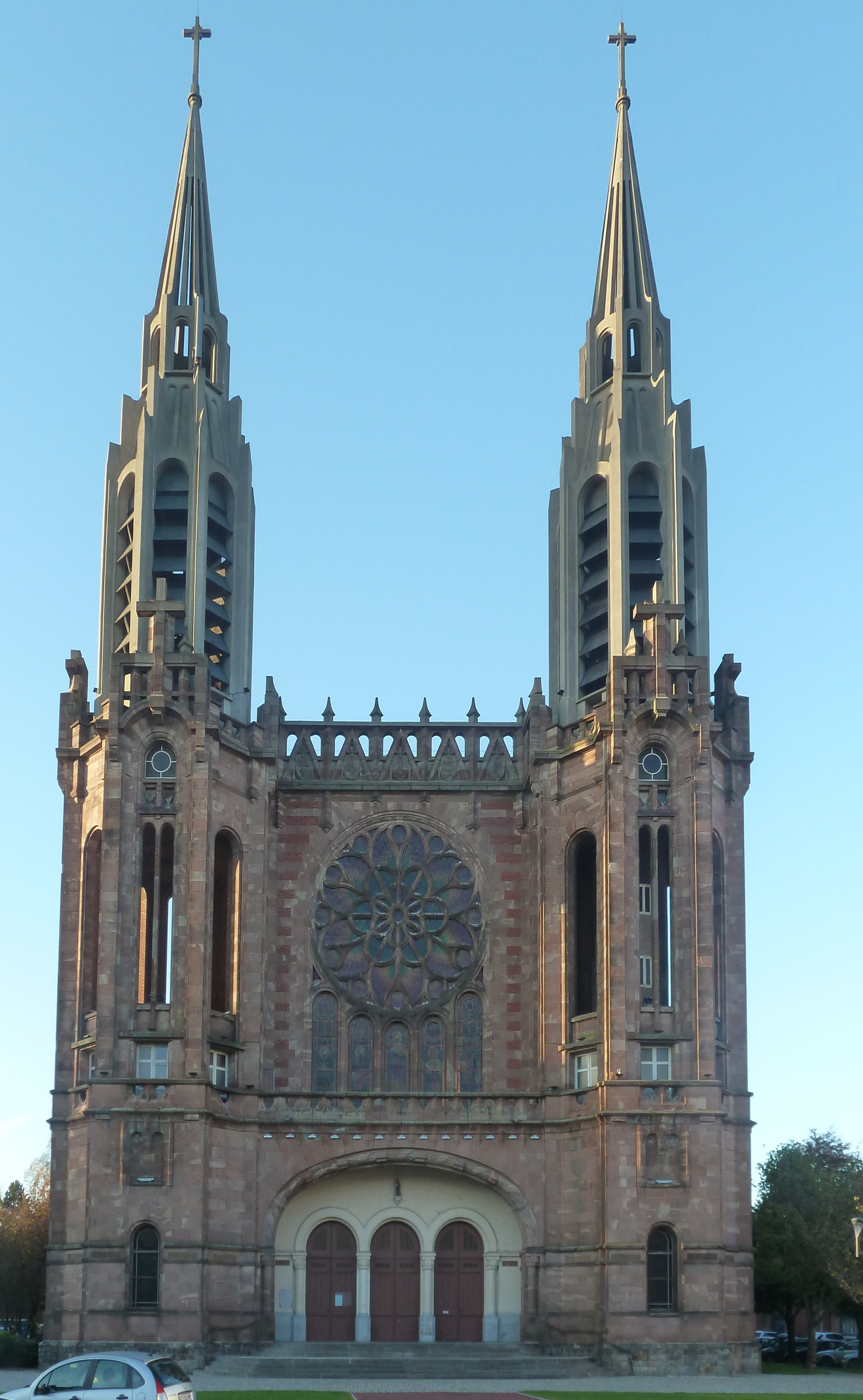 Armentières, place de la République : l'église Notre-Dame du Sacré-Cœur - architecte Gaston Trannoy (dossier LH 19800035/0113/14242).